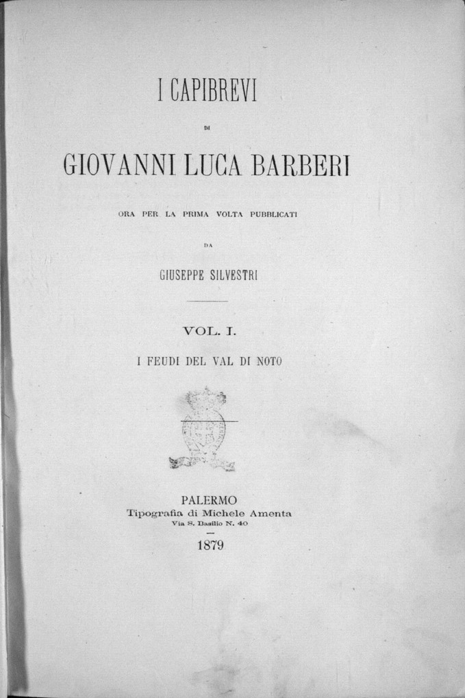 Frontespizio